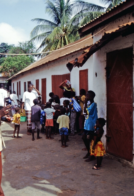 In einem Compound in Bakau